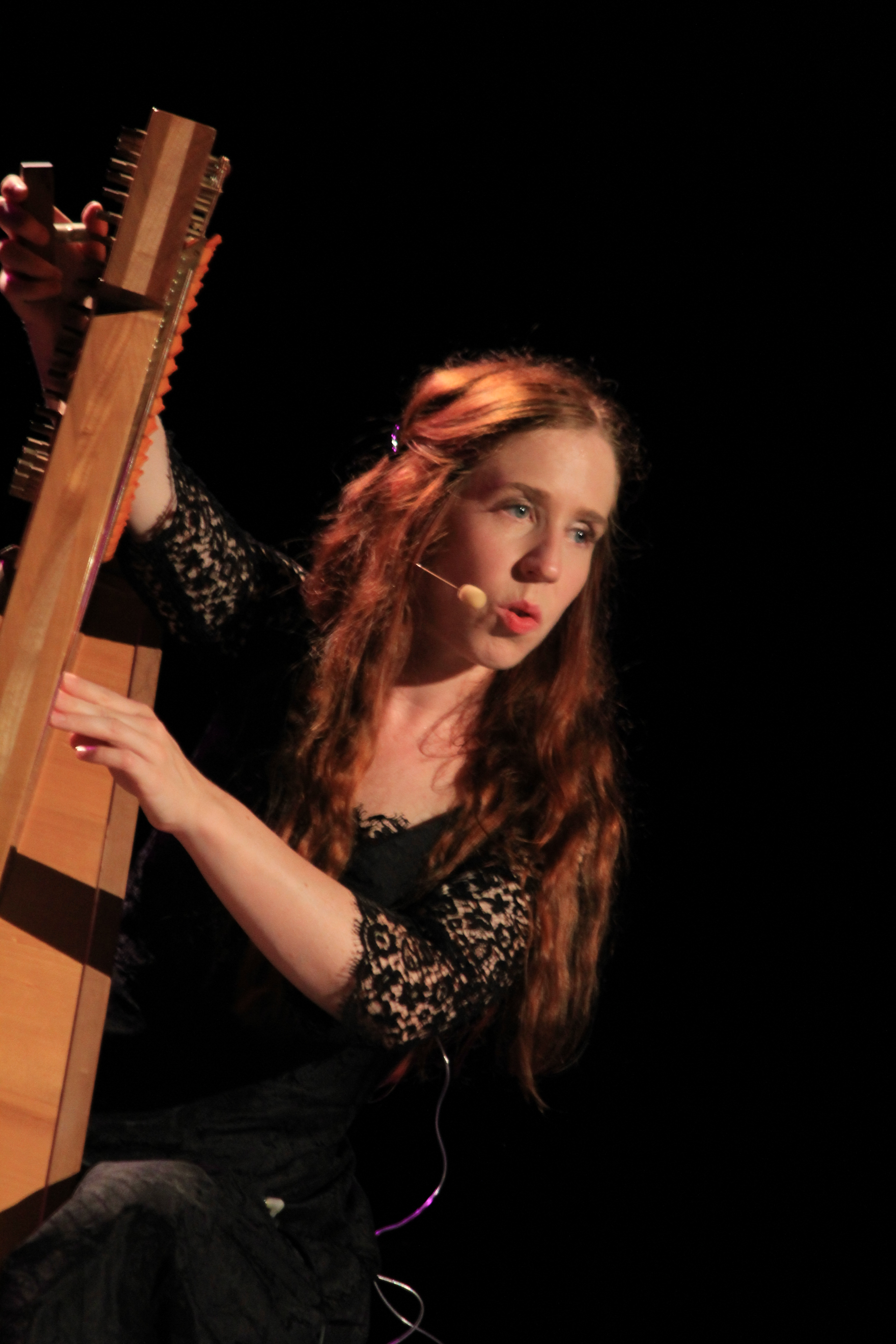 Cécile Corbel en concert lors du festival interceltique de Lorient 2014.